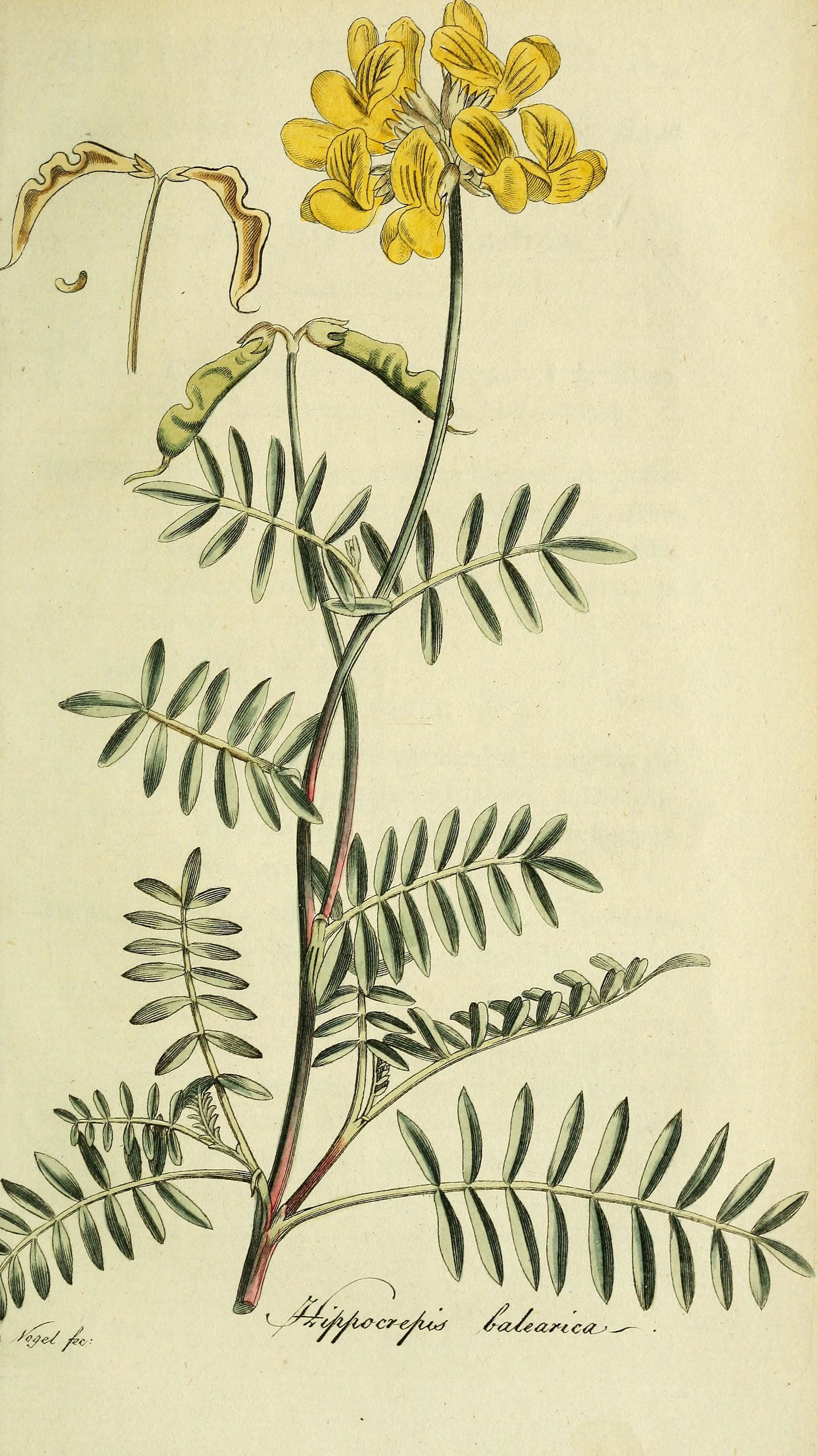 ^^-^yu^cr^ic^f /a/tt